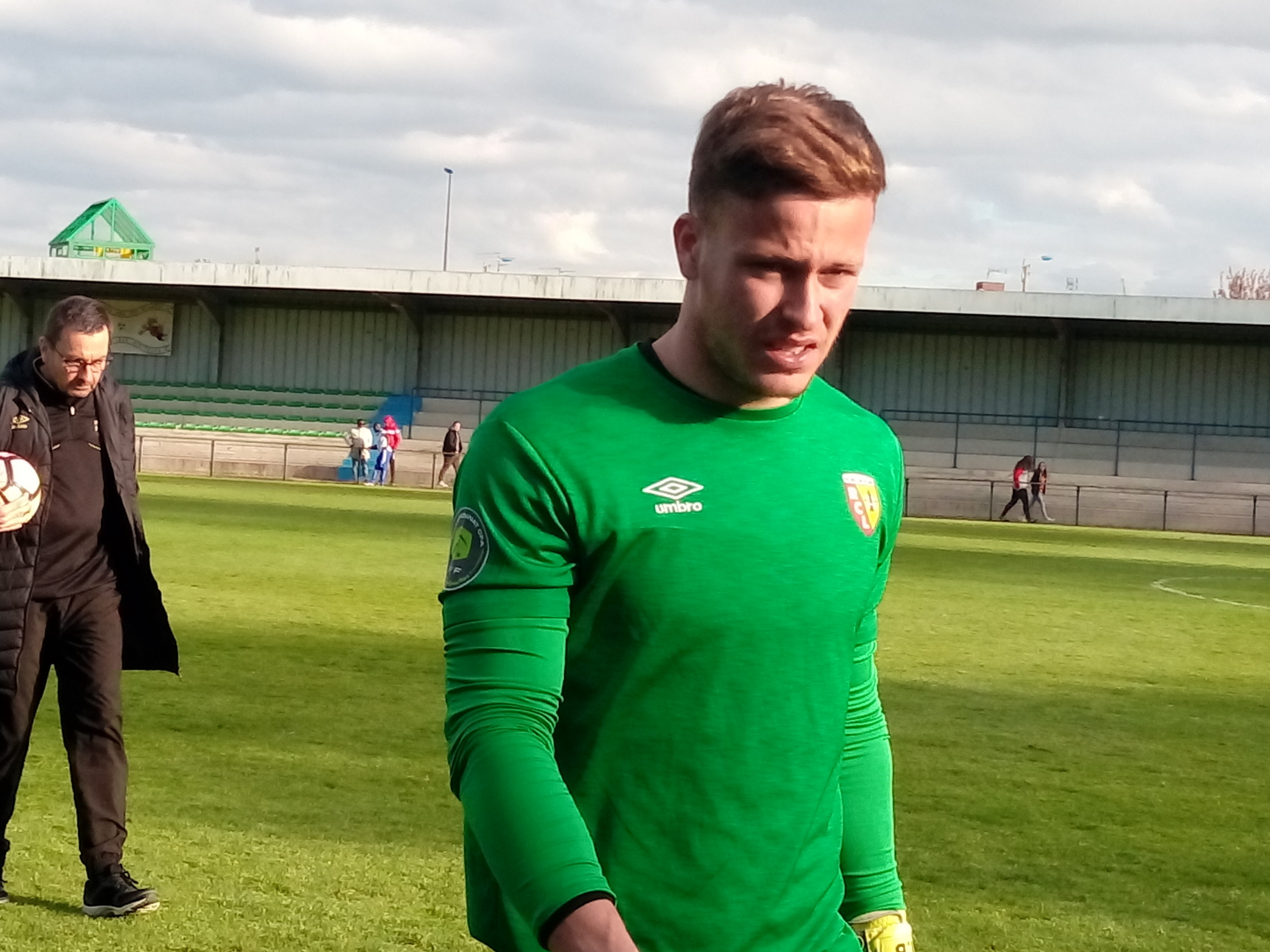 Valentin Belon lors du match Lens B / Entente SSG, comptant pour la vingt-septième journée du Championnat de CFA 2016-2017, le 22 avril 2017.